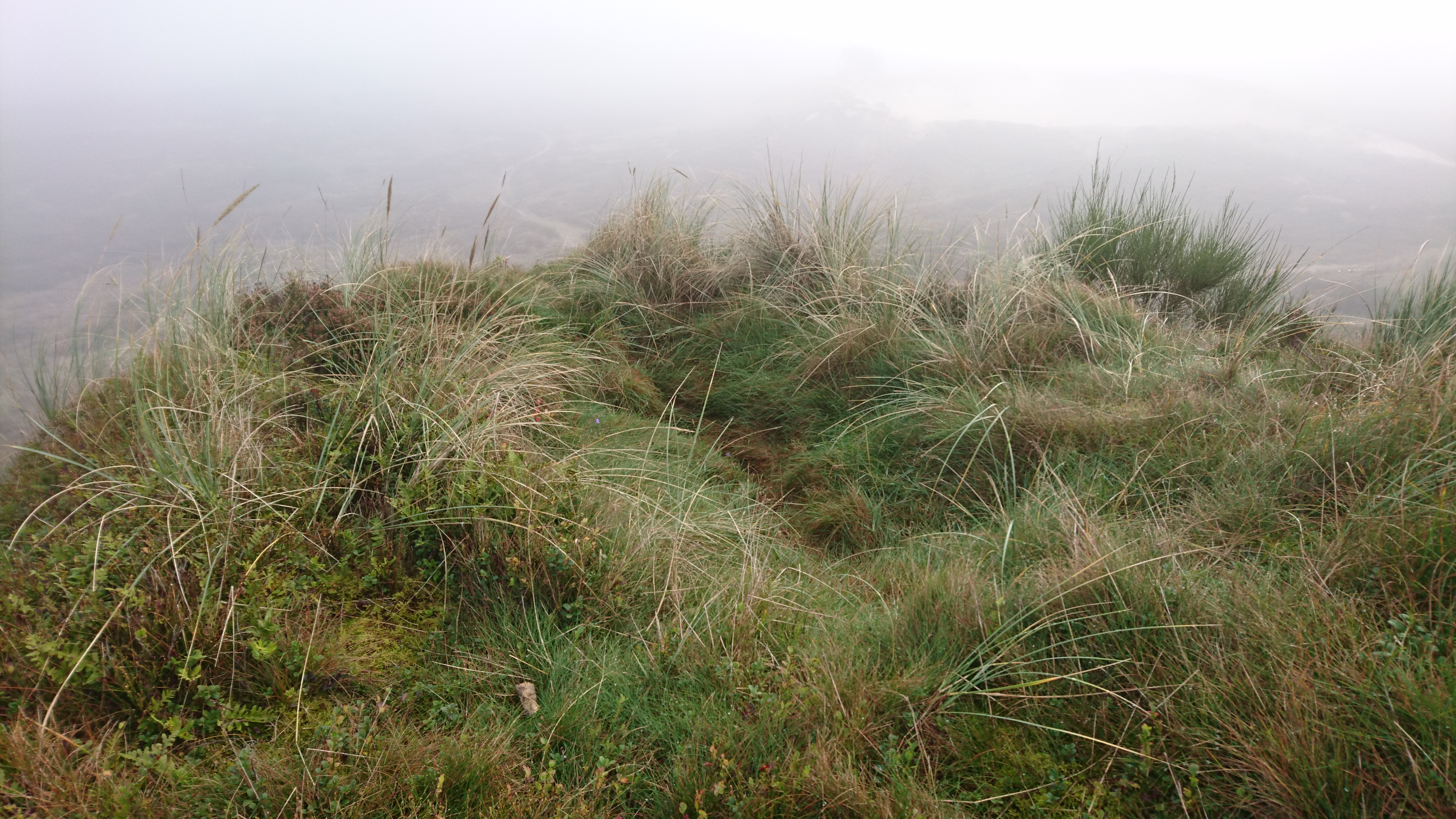 Maskingevær rede fra anden verdenskrig krig på toppen af Stoltenbjerg i Randbøl Hede